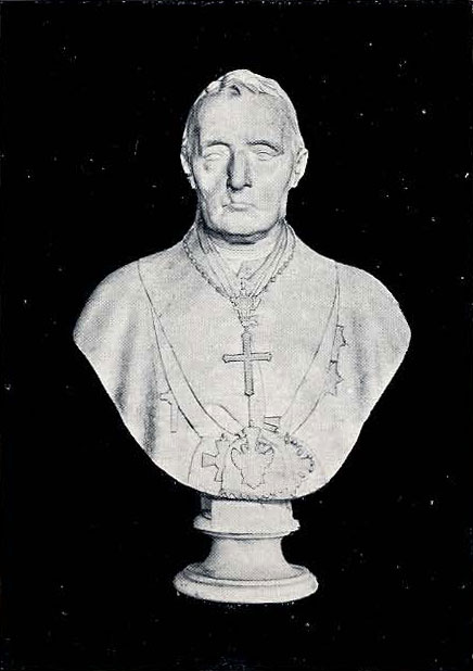 Беларуская (тарашкевіца): Бюст Станіслава Богуша Сестранцэвіча (Stanisłaŭ Bohuš Siestrancevič)